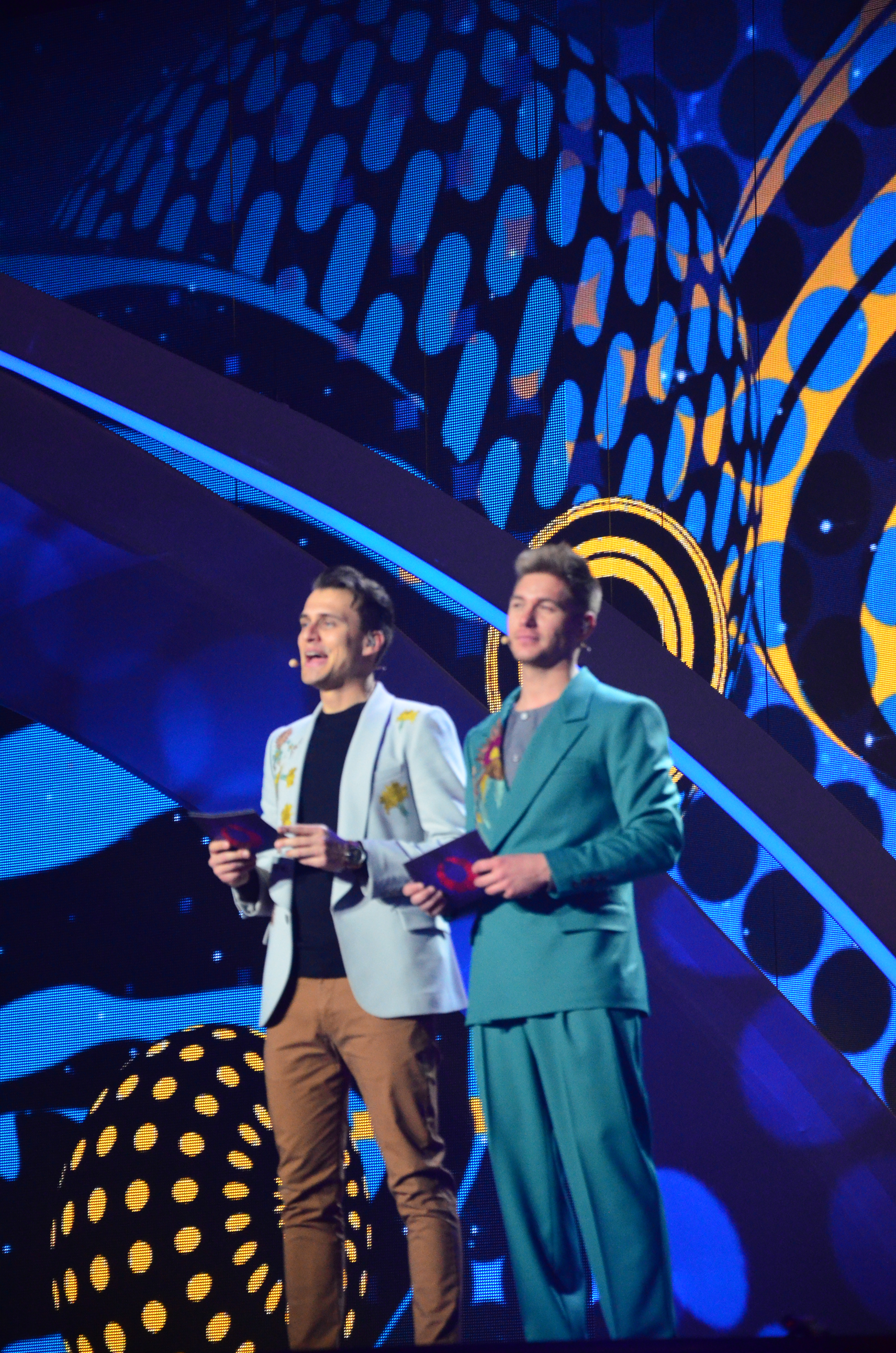 10 травня 2017 року у Києві відбулась генеральна репетиція 2 півфіналу "Євробачення".